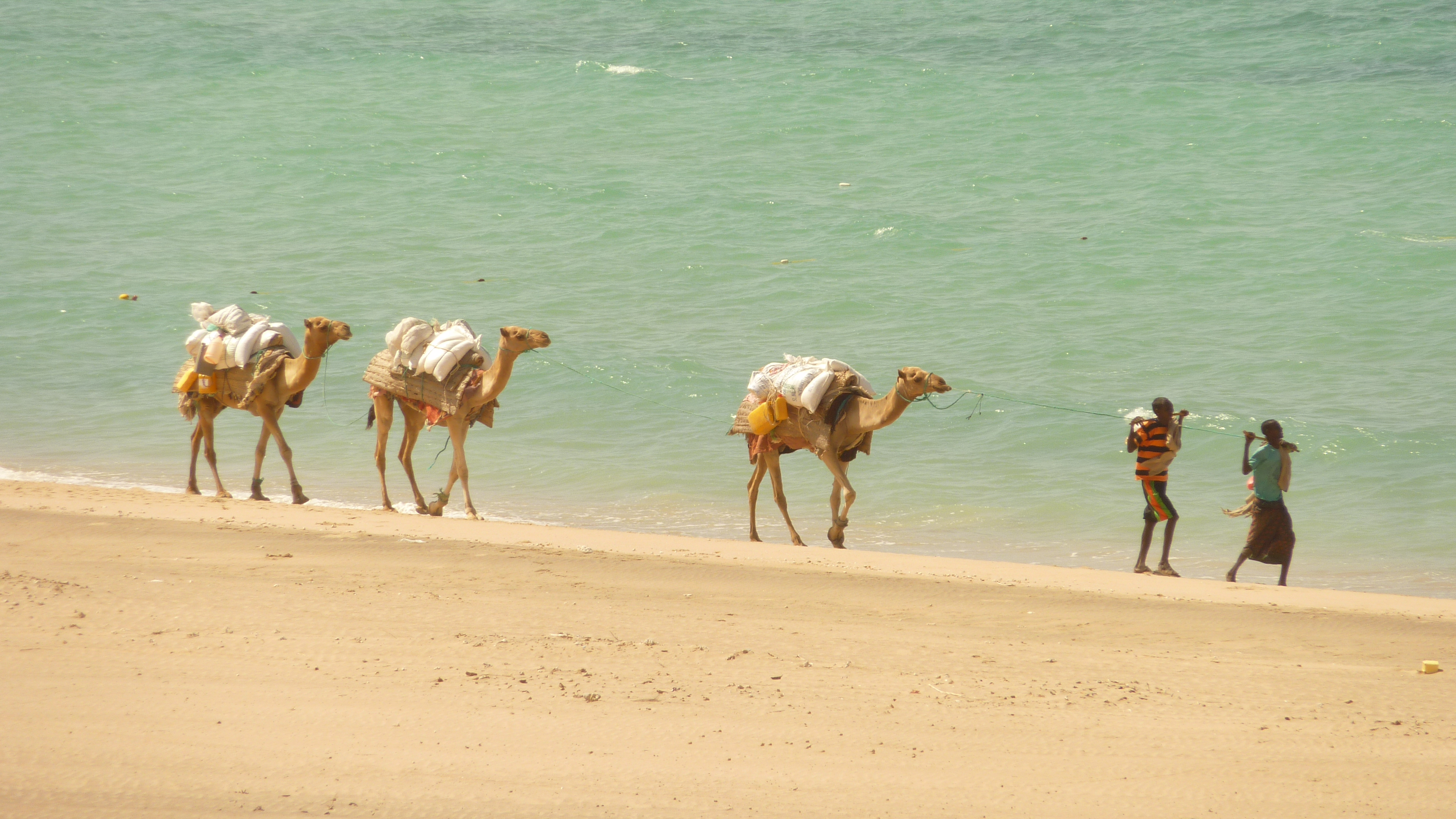 Berbera, Somaliland